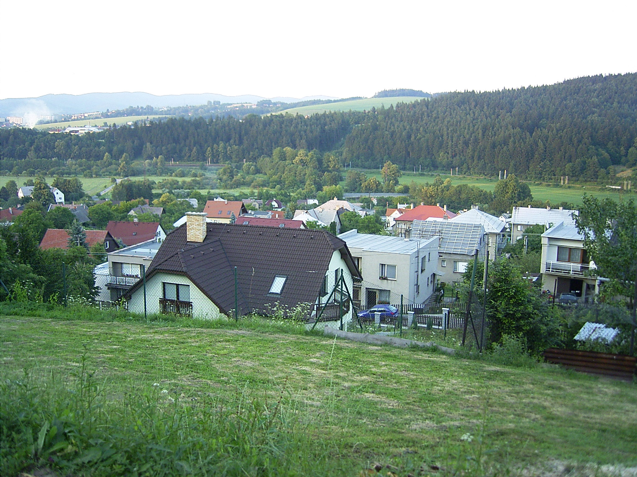 Obec Jarcová